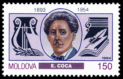 Moldovan stamp of Eugen Coca